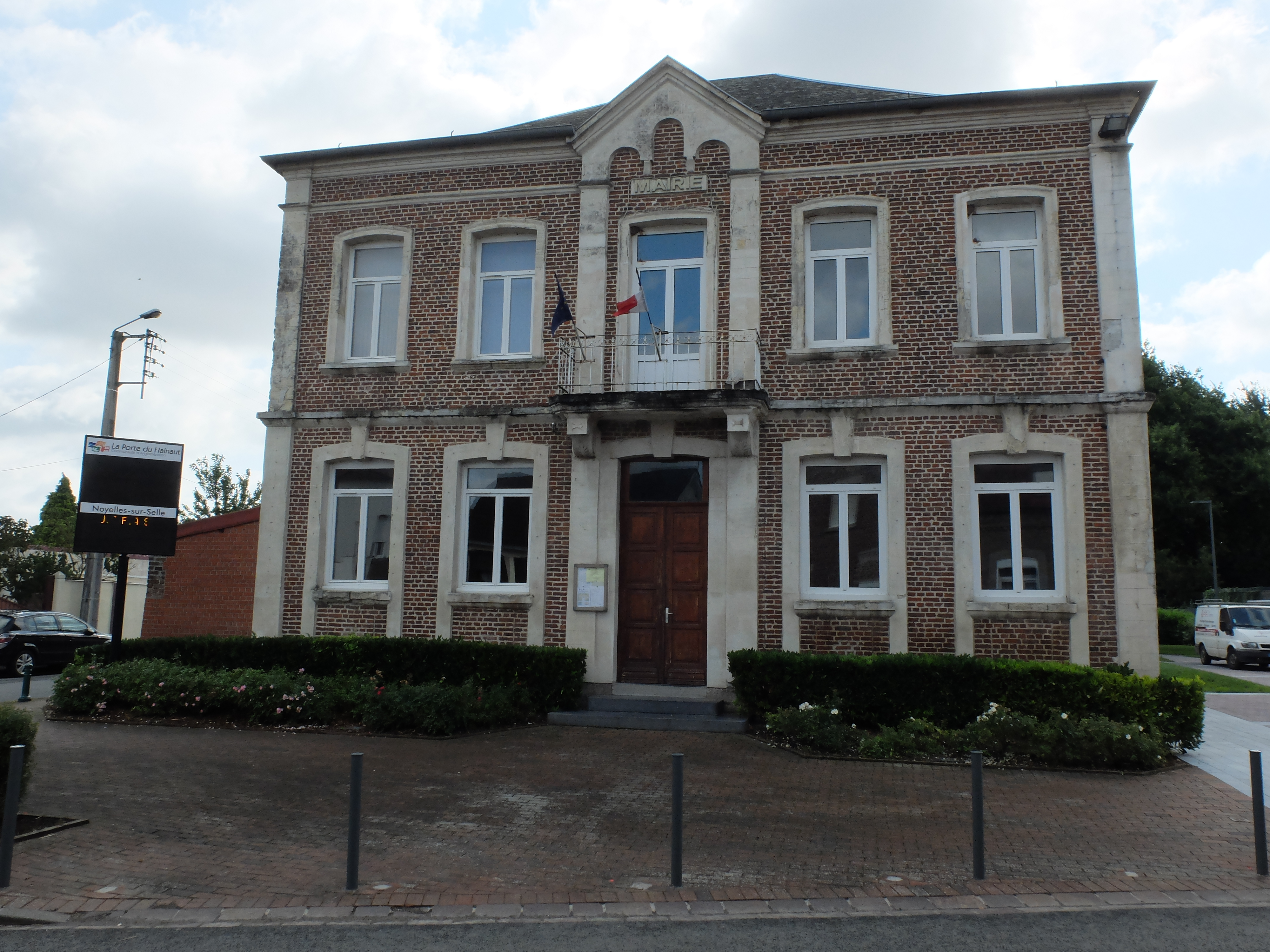 Vue de la mairie de Noyelles-sur-Selle.